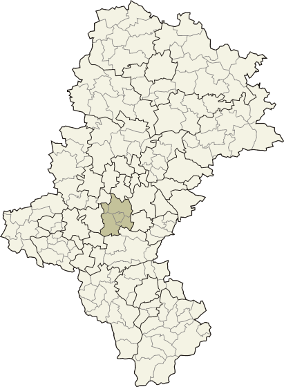 Powiat mikołowski w województwie śląskim